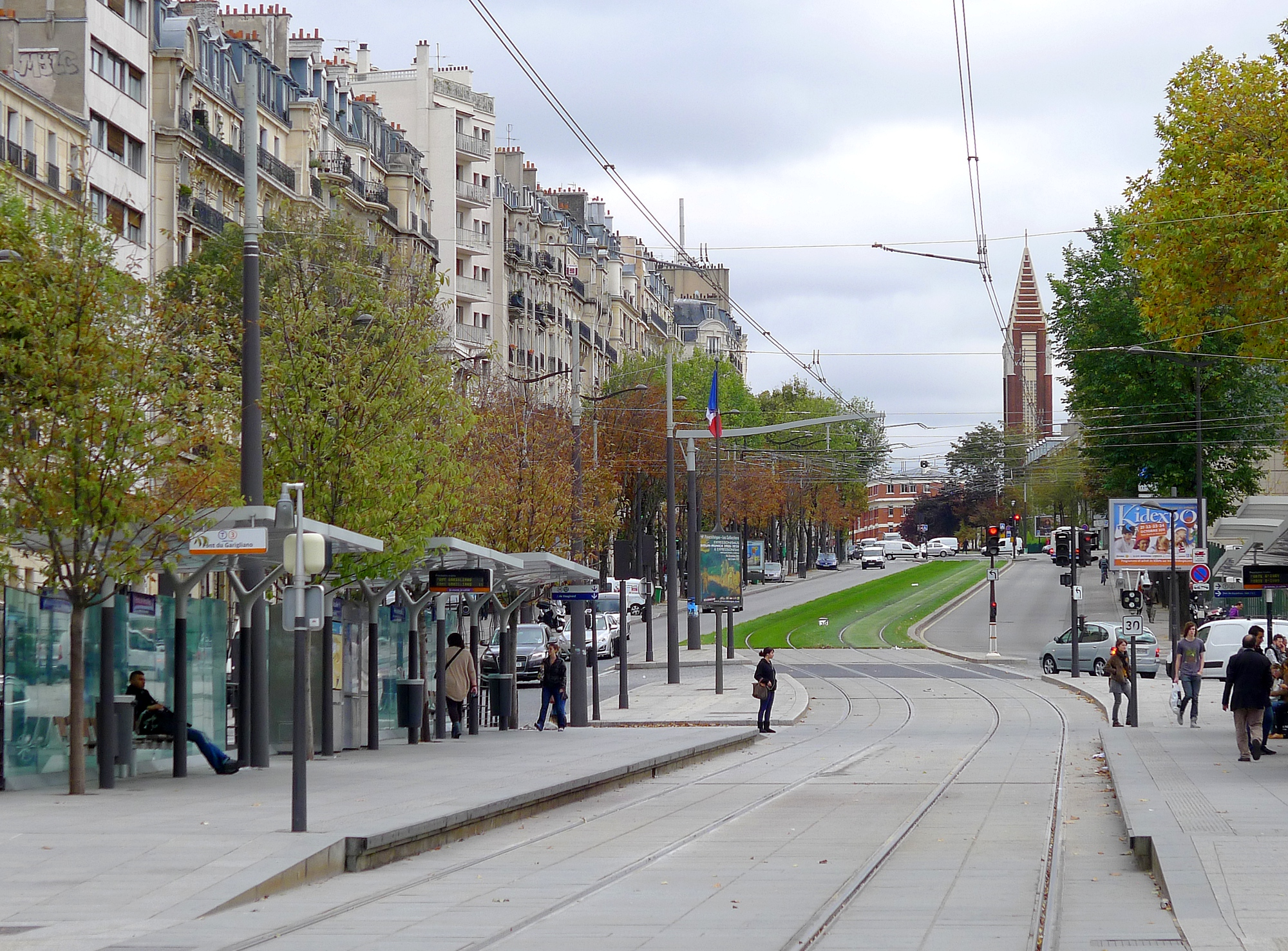 Boulevard Lefebvre et ligne T3 à la porte de Versailles - Paris XV